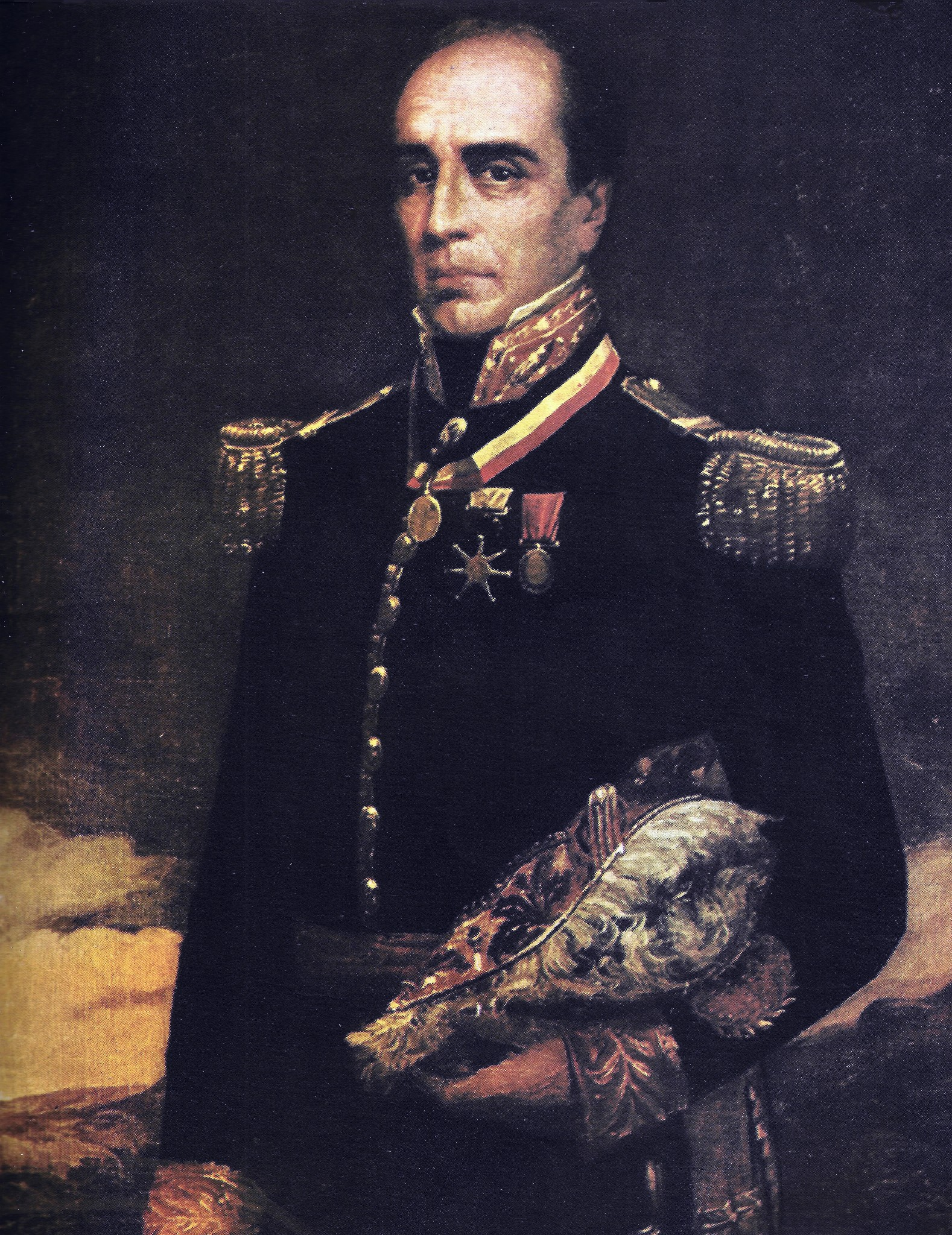 retrato del General en Jefe Rafael Urdaneta por Martín Tovar y Tovar en 1874, óleo sobre tela, localizado en el Salón Azul, del edificio de la Asamblea Nacional de la República Bolivariana de Venezuela. Dicho retrato de Tovar y Tovar fue el modelo para el diseño del billete de 20 Bolívares de fecha de emisión octubre 20, 1987 el cual se emitió con motivo de la celebración de 200 aniversario del natalicio del héroe zuliano.